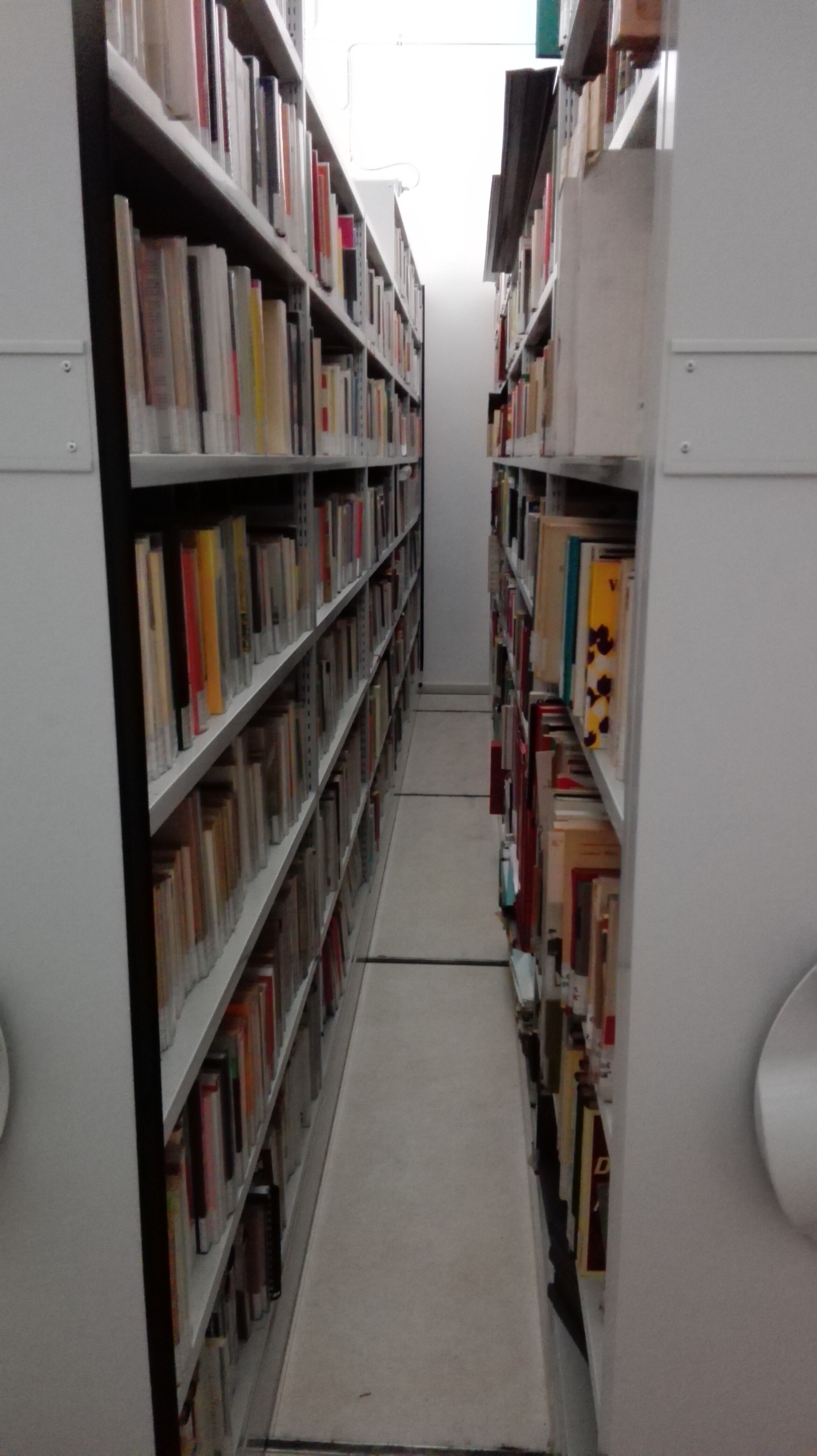 Uno degli scaffali che custodiscono le opere e i documenti.